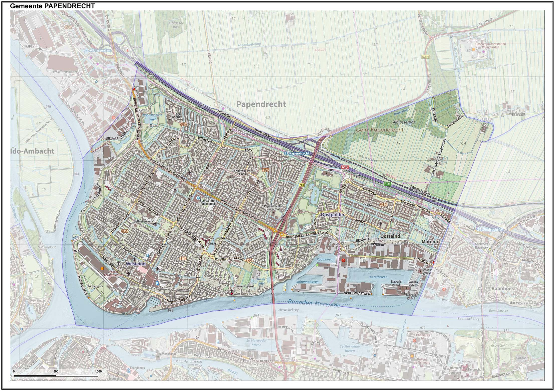 Topografische gemeentekaart. Resolutie: 400 pixels/km. Kaartbeeld samengesteld uit de open geodata van de Top10NL en Top25namen (Kadaster), Creative Commons-BY licentie. Gebouwvlakken uit open geodata BAG extract. Wegen uit de OpenStreetMap, OpenStreetMap community. Reliëfschaduw uit de Actuele Hoogtekaart AHN2. Samenstelling en kleurenschema: Jan-Willem van Aalst, met QGIS. Zie ook de Legenda.